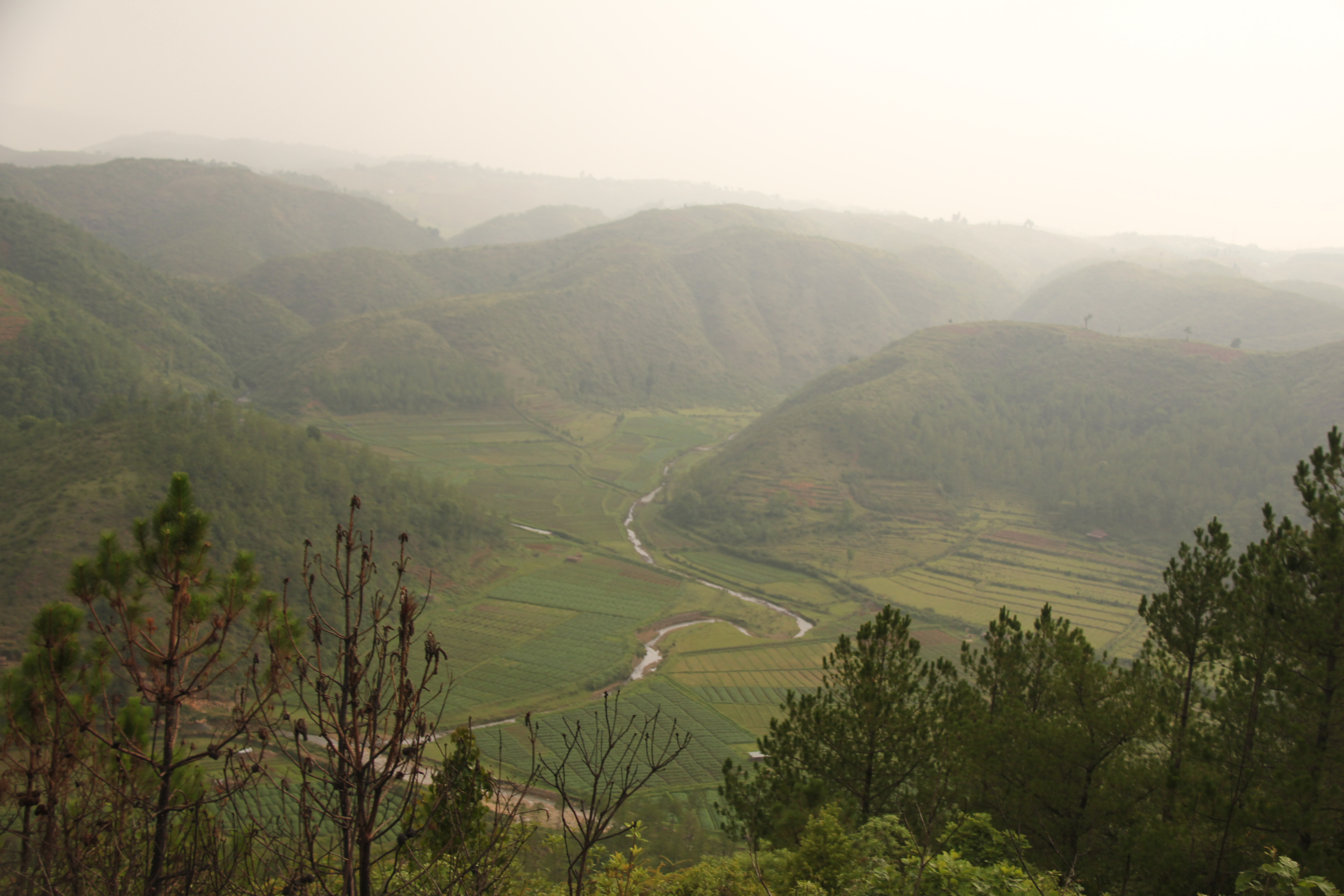 In East Khasi, Meghalaya